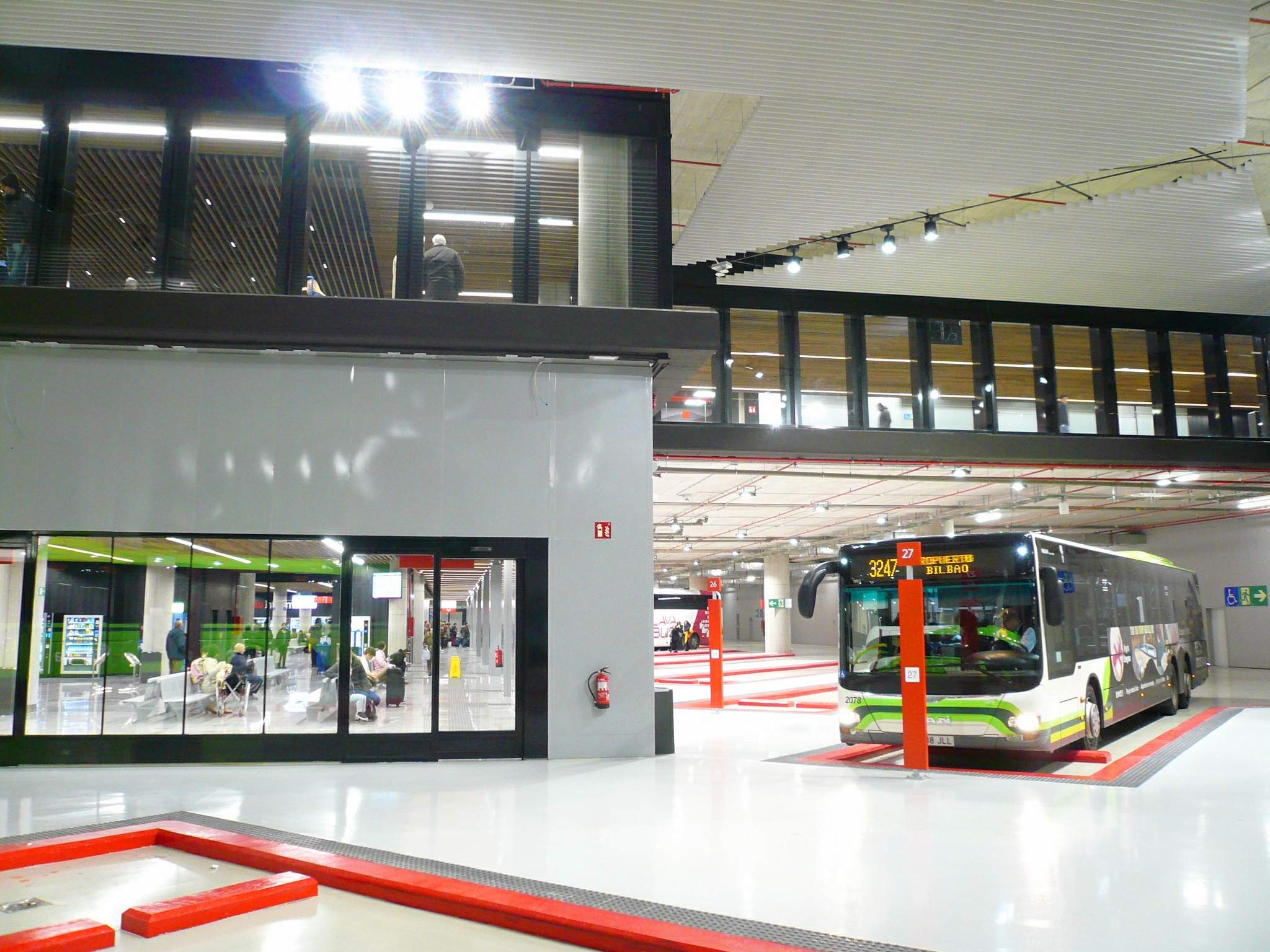 Intermodal de Bilbao, fotografiada el 30 de diciciembre de 2019